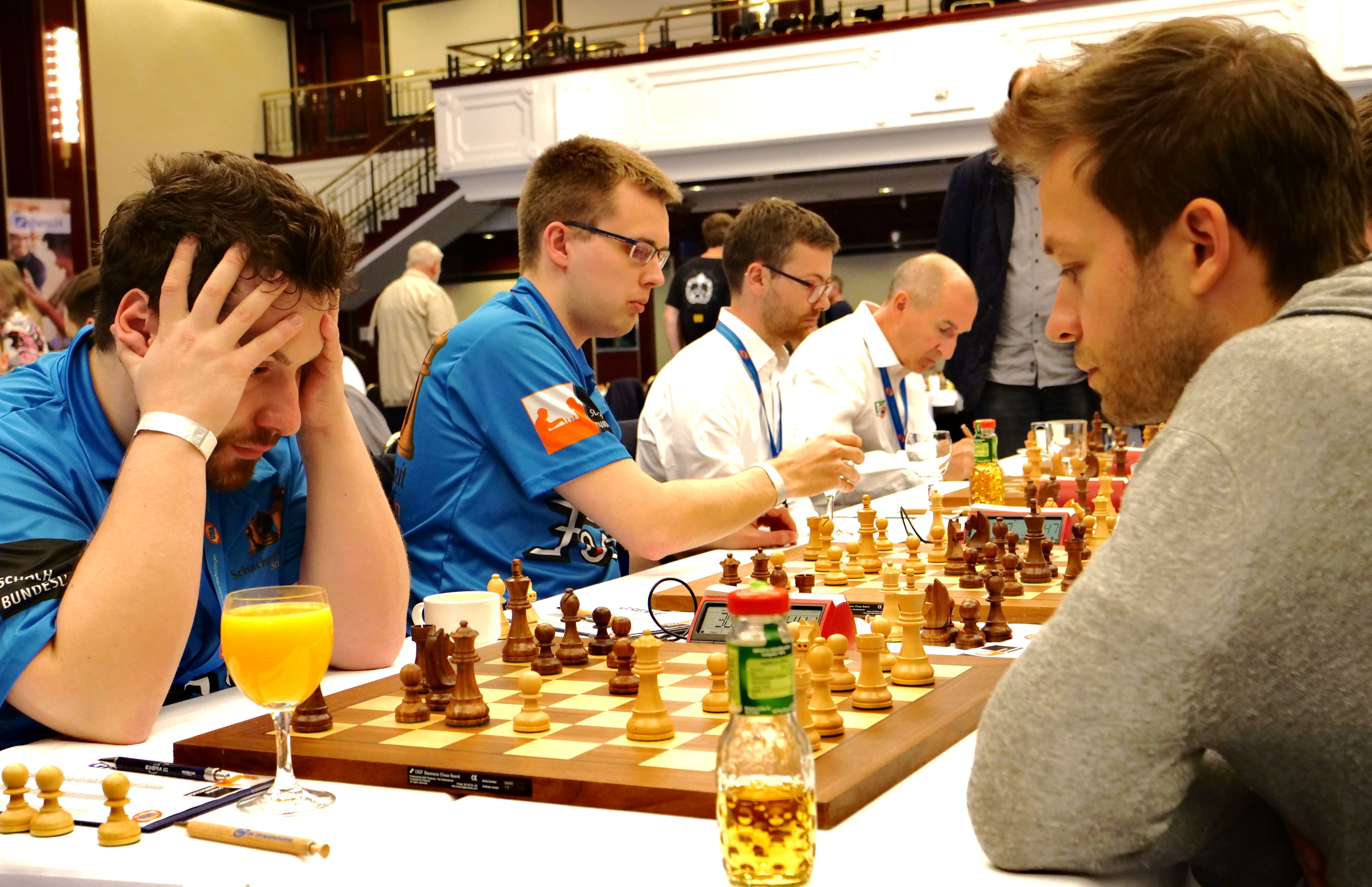 Predojevic, Andersen, Hoffmann, Gauglitz und Zaragatski - Bundesliga-Endrunde 30-4-2018